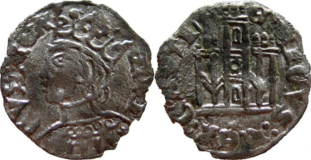 Tipo de moneda: CORNADO de Enrique II (tipo 2). Ceca: TOLEDO (T debajo del castillo). Medida: 18 mm. Peso: 0.9 gr. Anverso: ENRICVS REX alrededor de un busto del rey rompiendo la leyenda. Reverso: ENRICVS REX CASTE alrededor de un castillo de 3 torres.